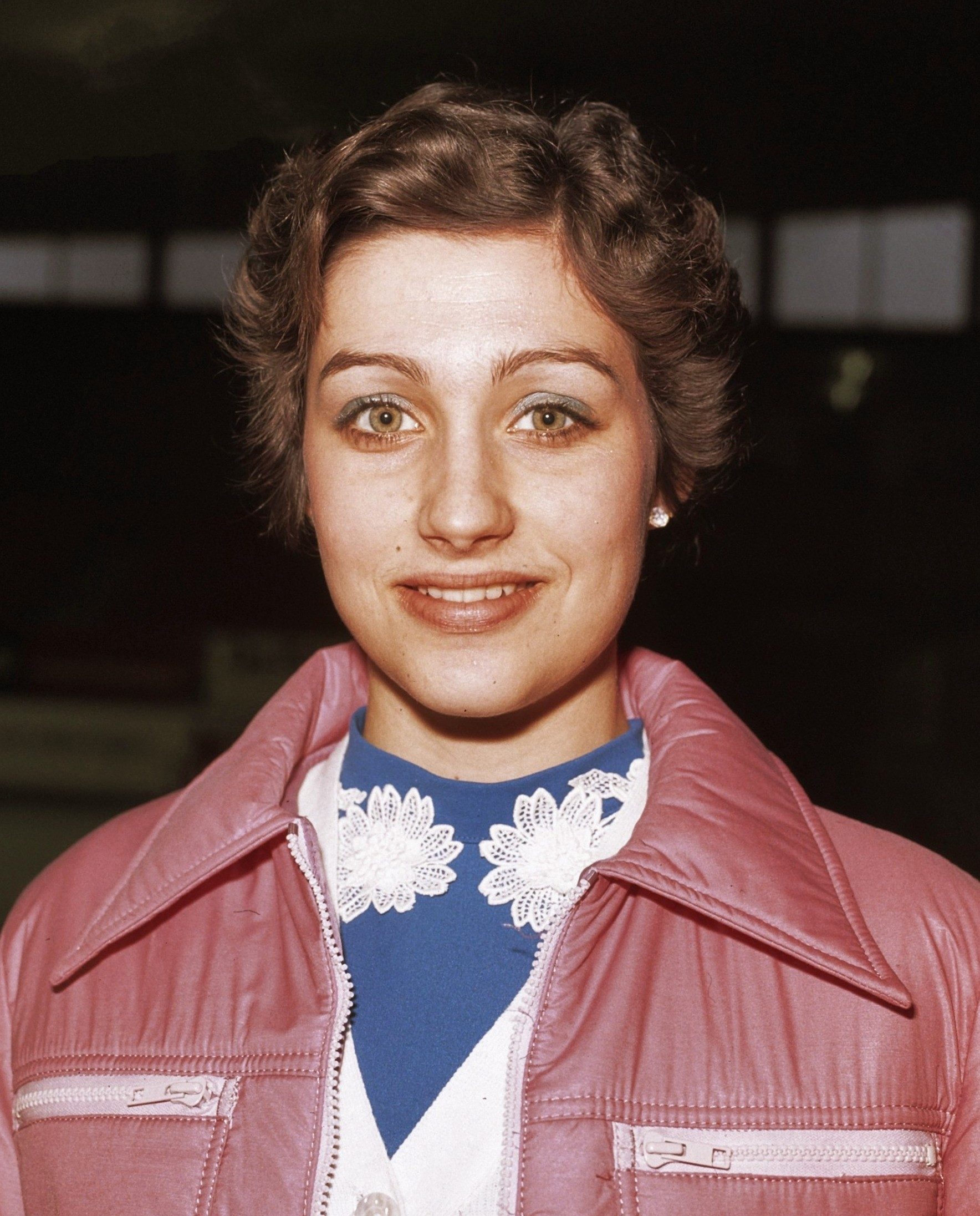 Dianne de Leeuw